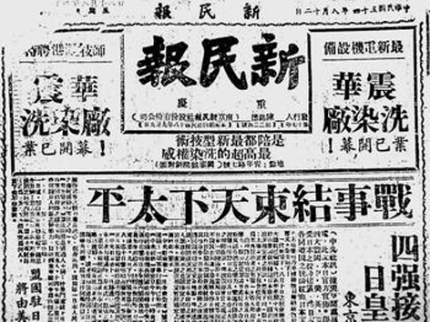 新民報1945年8月12日頭版（報紙封面）